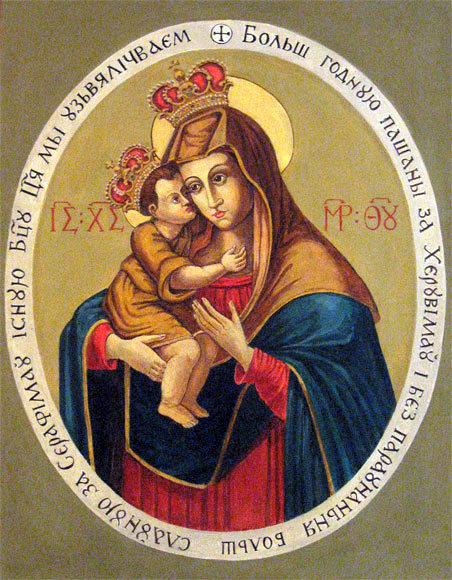 Беларуская (тарашкевіца): Абраз Маці Божай Жыровіцкай